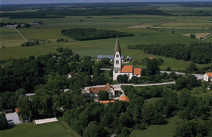 Motiv: Rone kyrka Nyckelord: Flygbilder, Riksintressen Kategori: KyrkomiljöRone kyrka